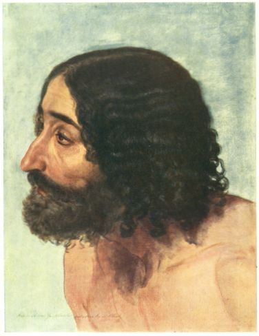 Мужская голова. Этюд к картине. (Написано с Н.В. Гоголя). Киевский музей русского искусства